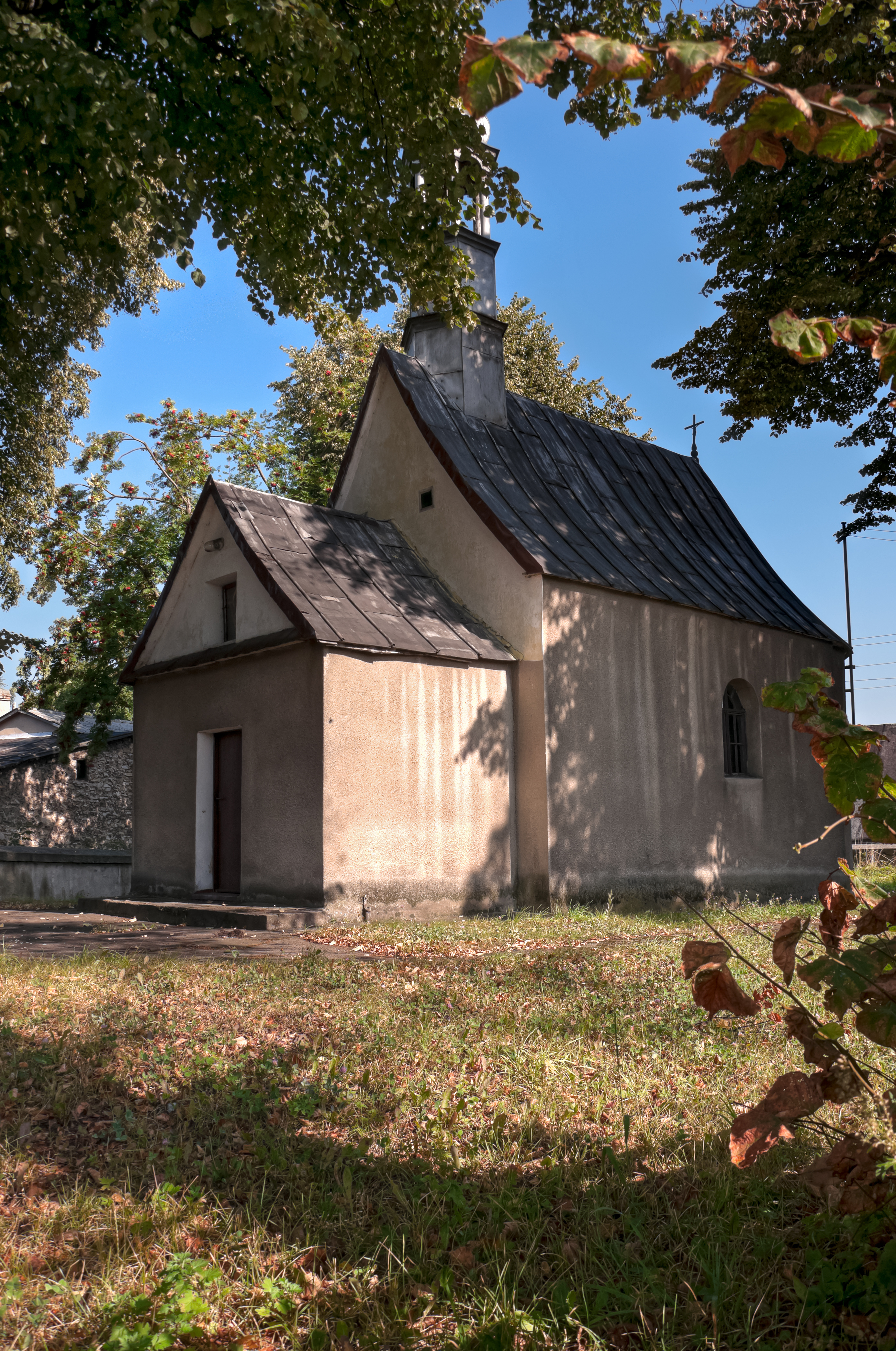 Kaplica p.w. św. Jakuba, z poł. XIX w w Sławkowie (zabytek nr rejestr. A 1245/81)